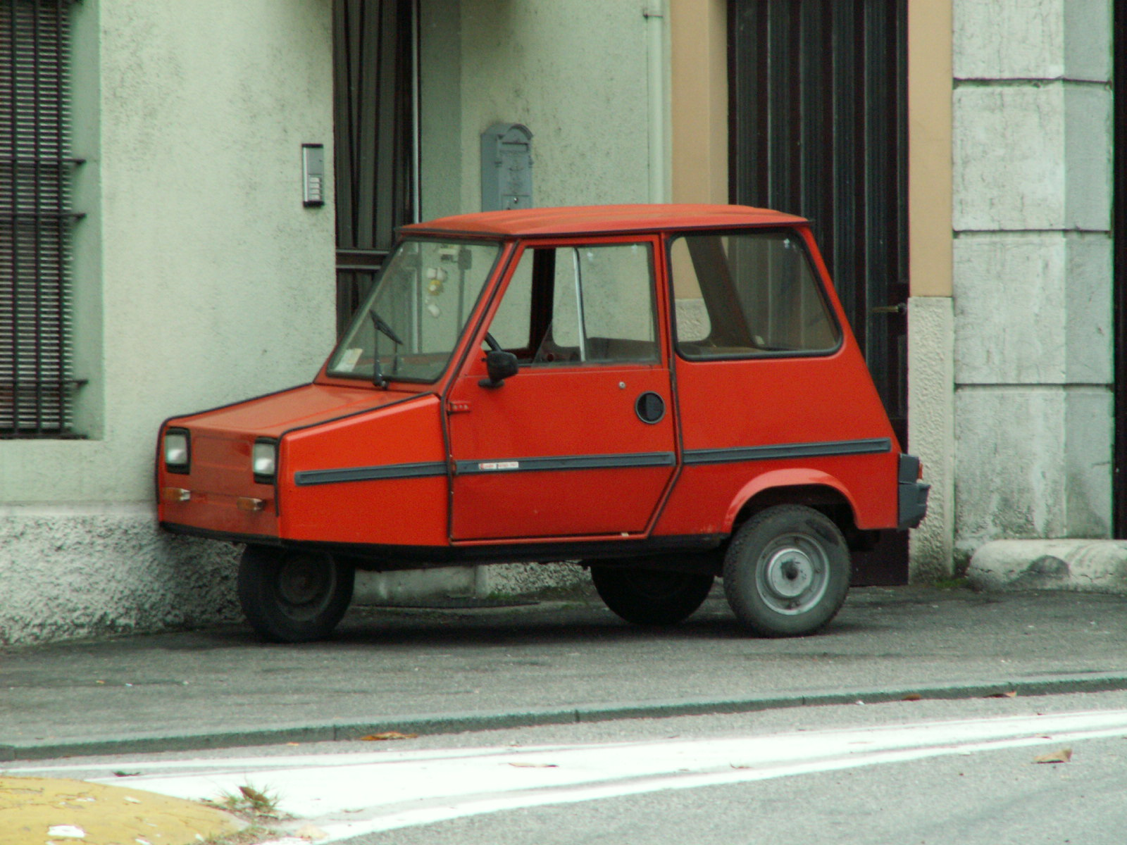 Sulky minicar, produced by italian manufacturer Casalini Mini autovettura Sulky della ditta Casalini